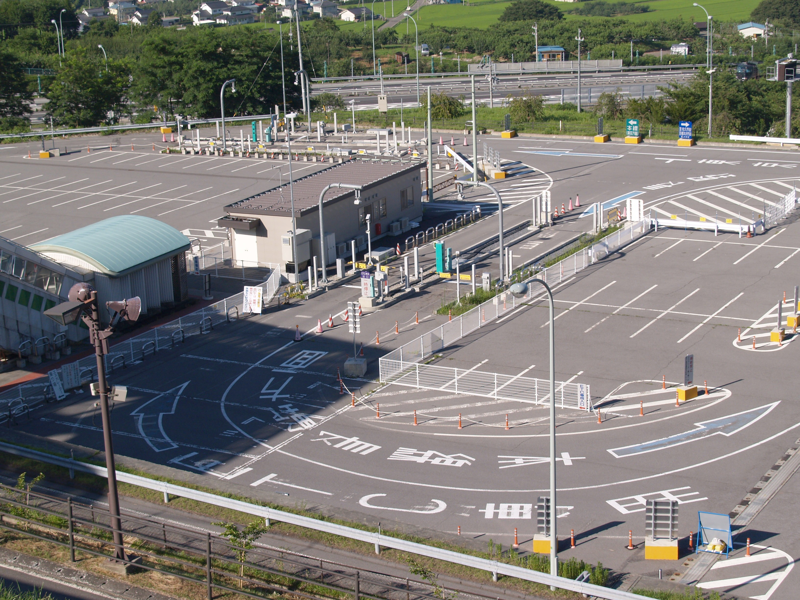 佐久平パーキングエリアに併設されているスマートインターチェンジ